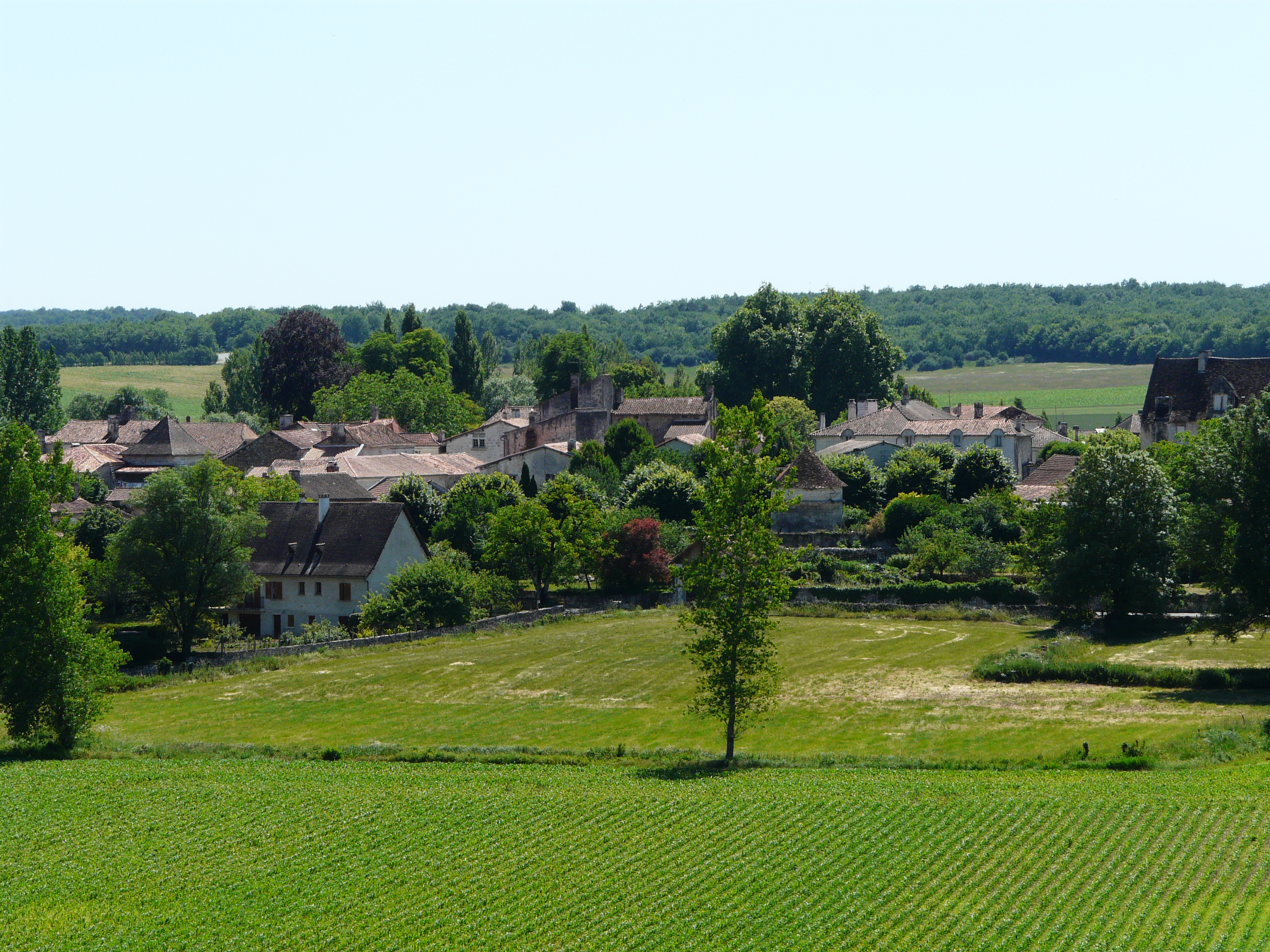 Le bourg de La Tour-Blanche vu du nord-est, Dordogne, France.